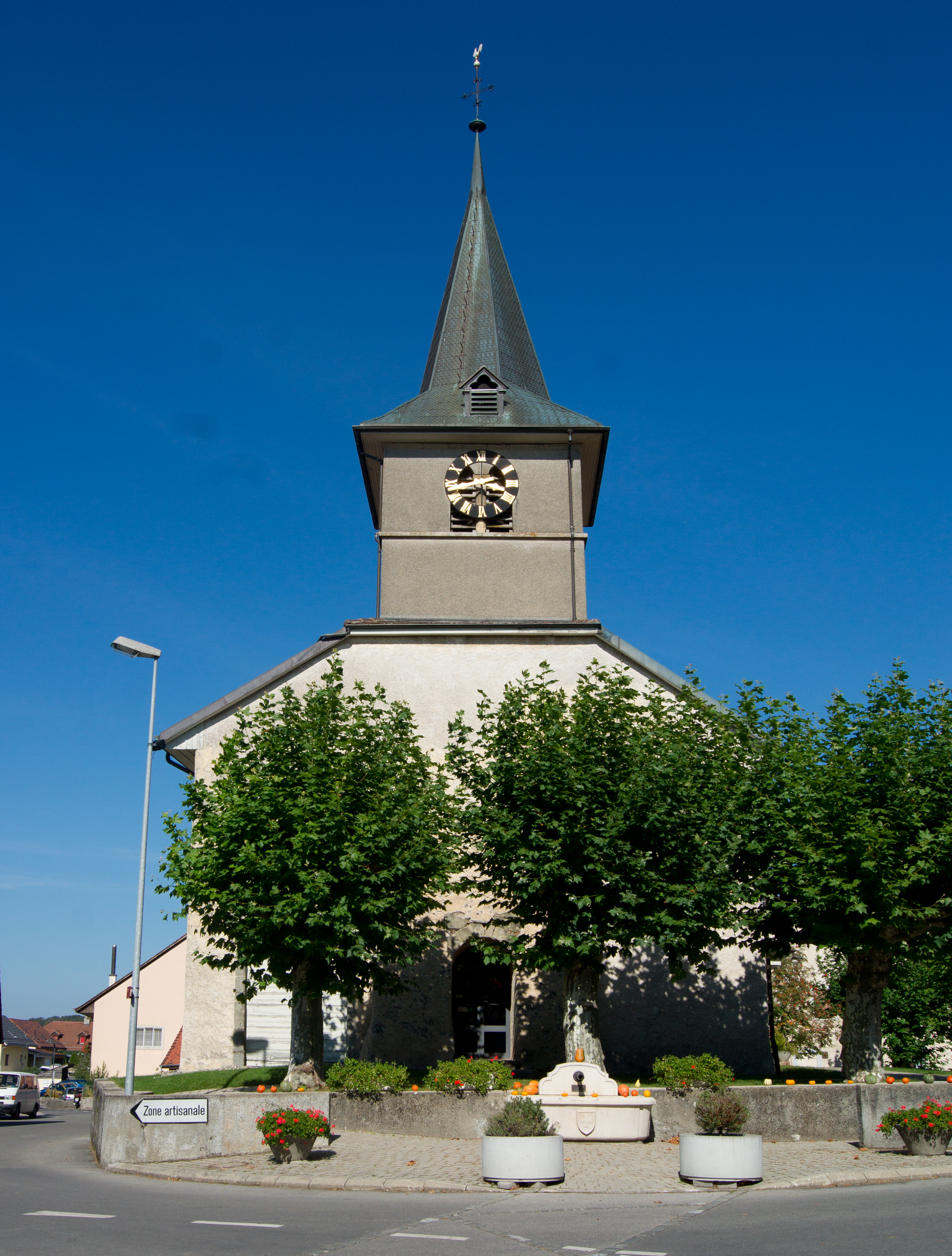 Eglise de Goumoens-la-Ville, Canton de Vaud, Suisse.